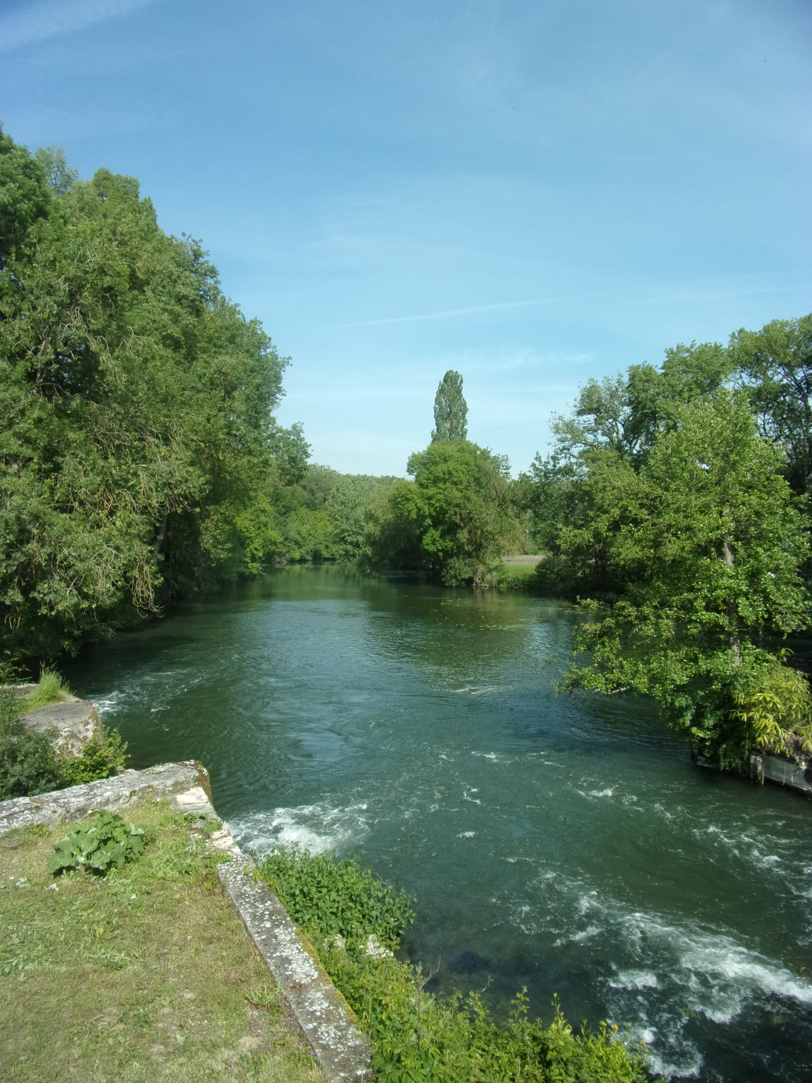 L'Indre (Monts, 37)